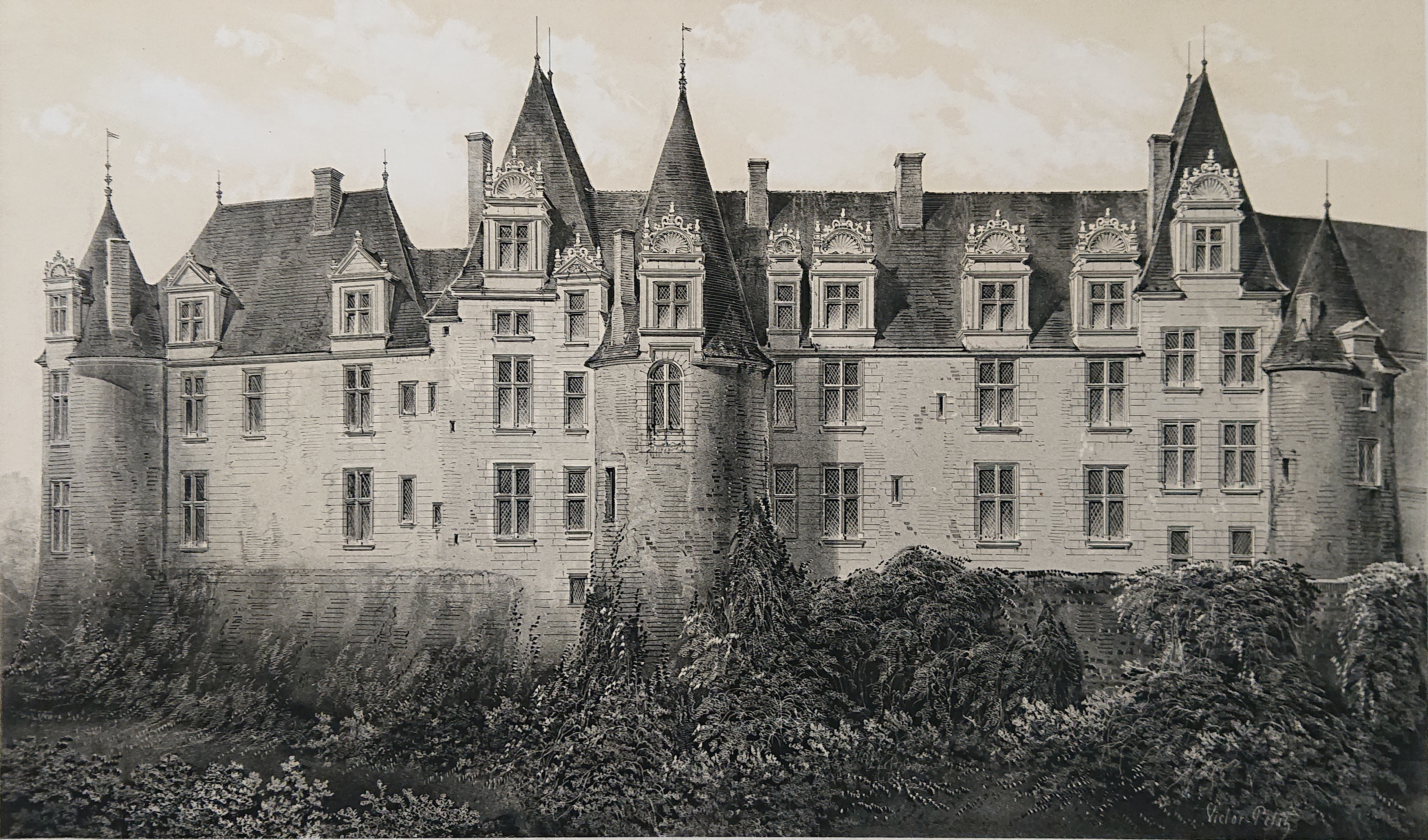 Le château de Châteaubriant, Victor Petit.